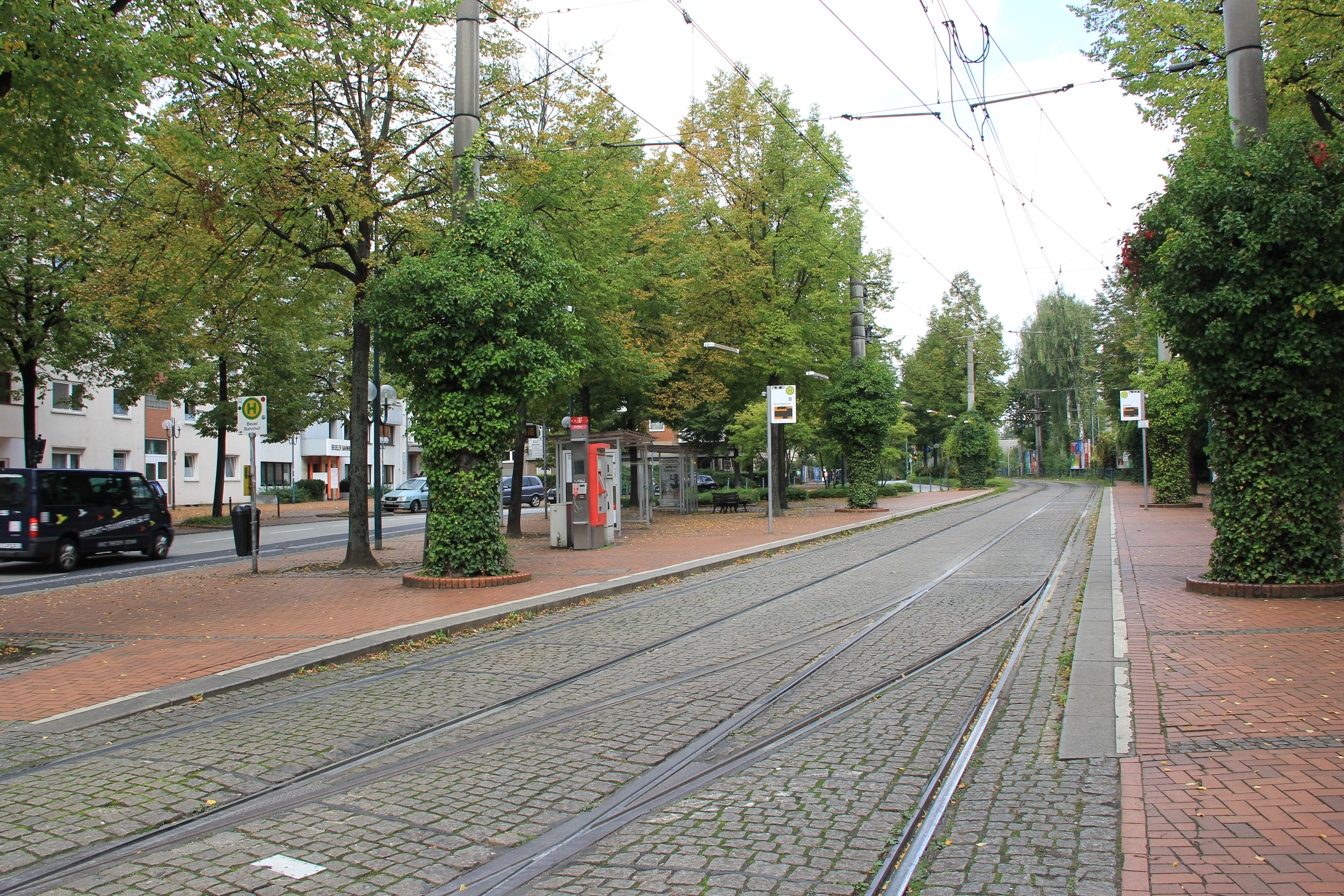 Straßenbahnhaltestelle Beuel Bahnhof der Siebengebirgsbahn (Linien 62/65) vor dem Bahnhof Bonn-Beuel an der Rechten Rheinstrecke in Bonn; links: Bushaltestelle Beuel Bahnhof.